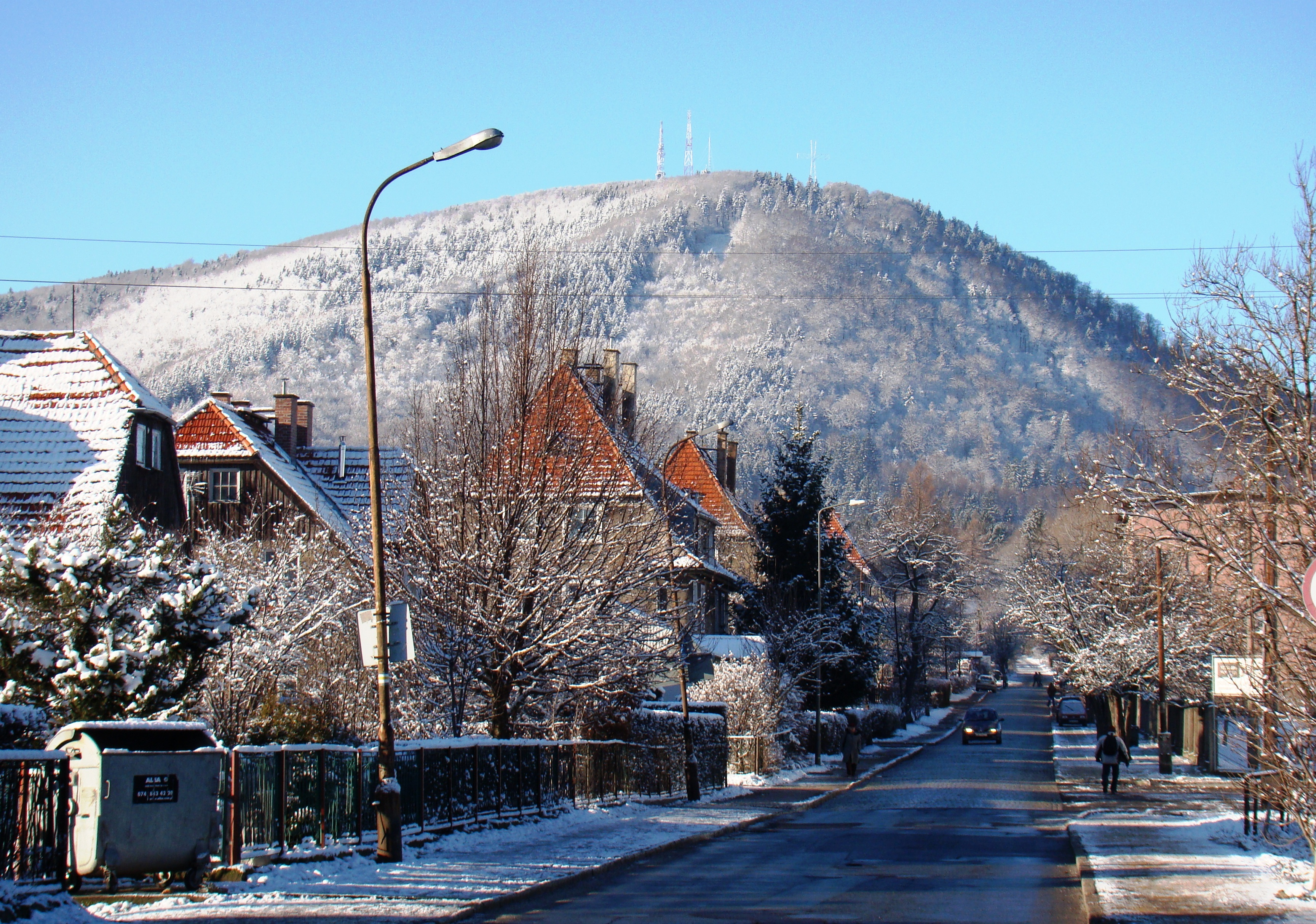 Wałbrzych - widok Chełmca z ulicy Piasta